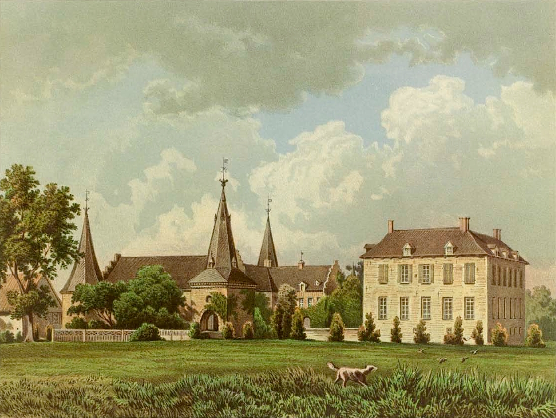 Schloss Haag in Geldern, Lithografie aus dem 19. Jahrhundert